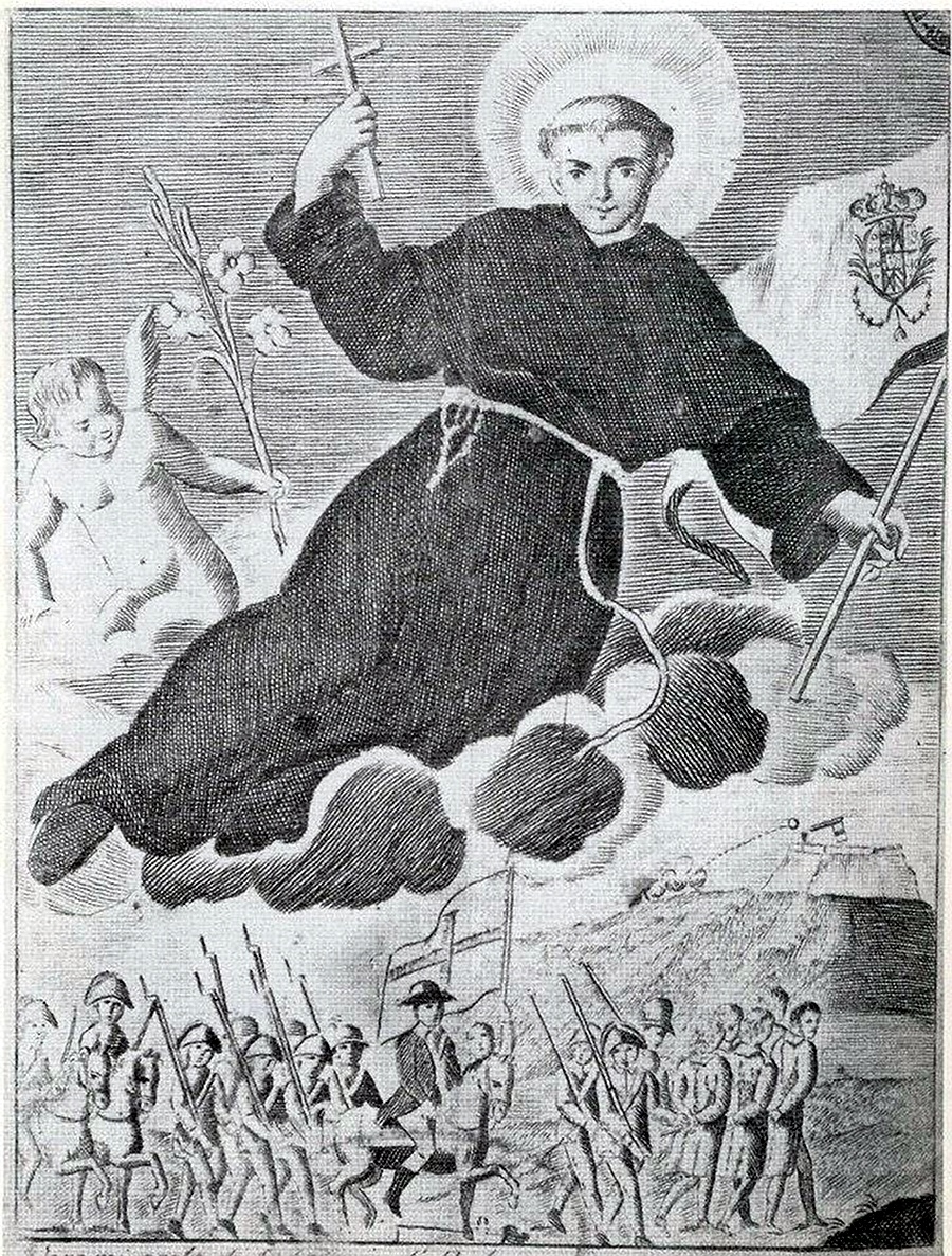 Il miracolo di Sant'Antonio durante l'avanzata dei sanfedisti (cannonata che abbatte il pennone della bandiera sul forte di San Elmo a Napoli)